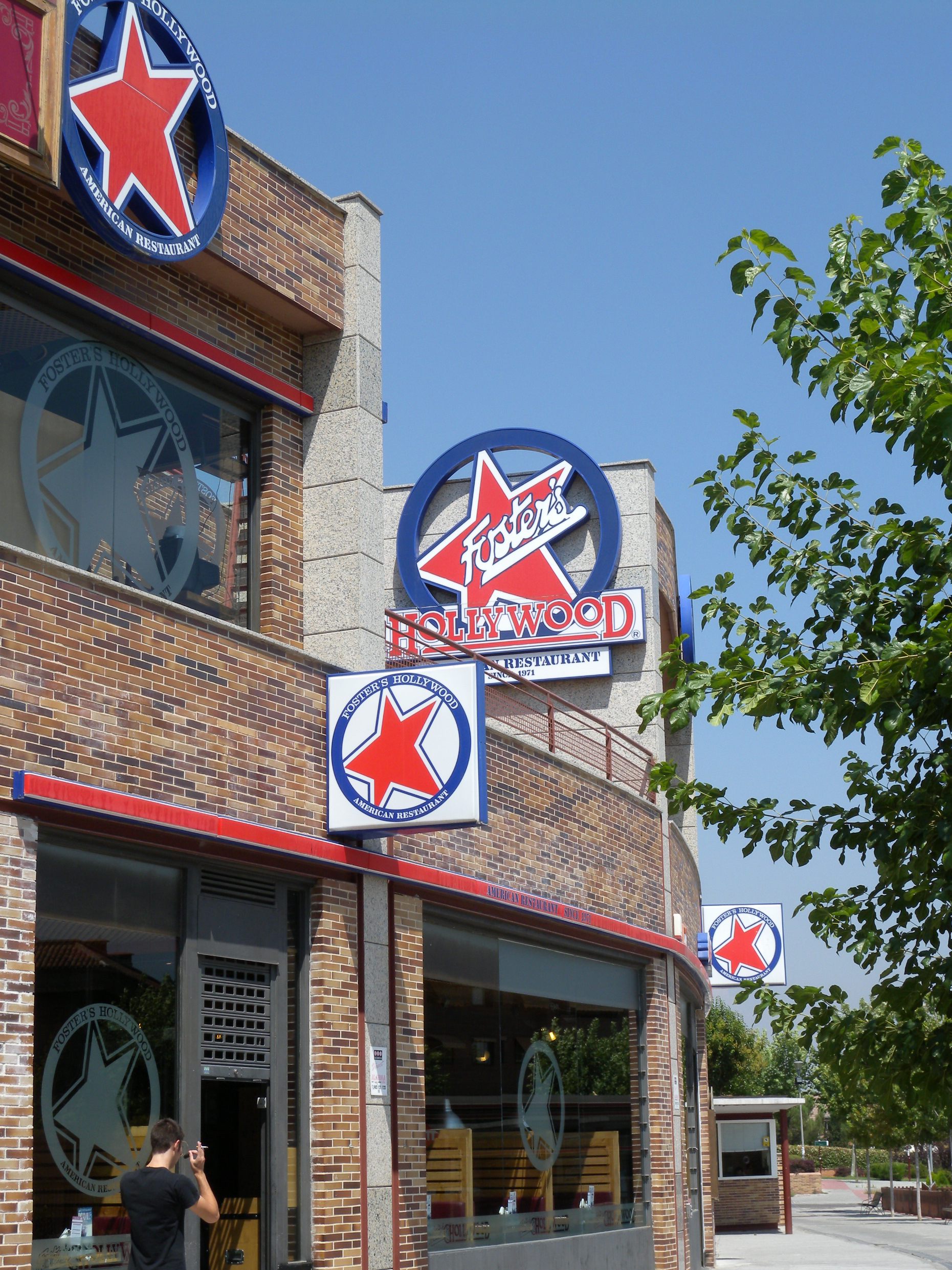 Pozuelo de Alarcón, Madrid, Spain